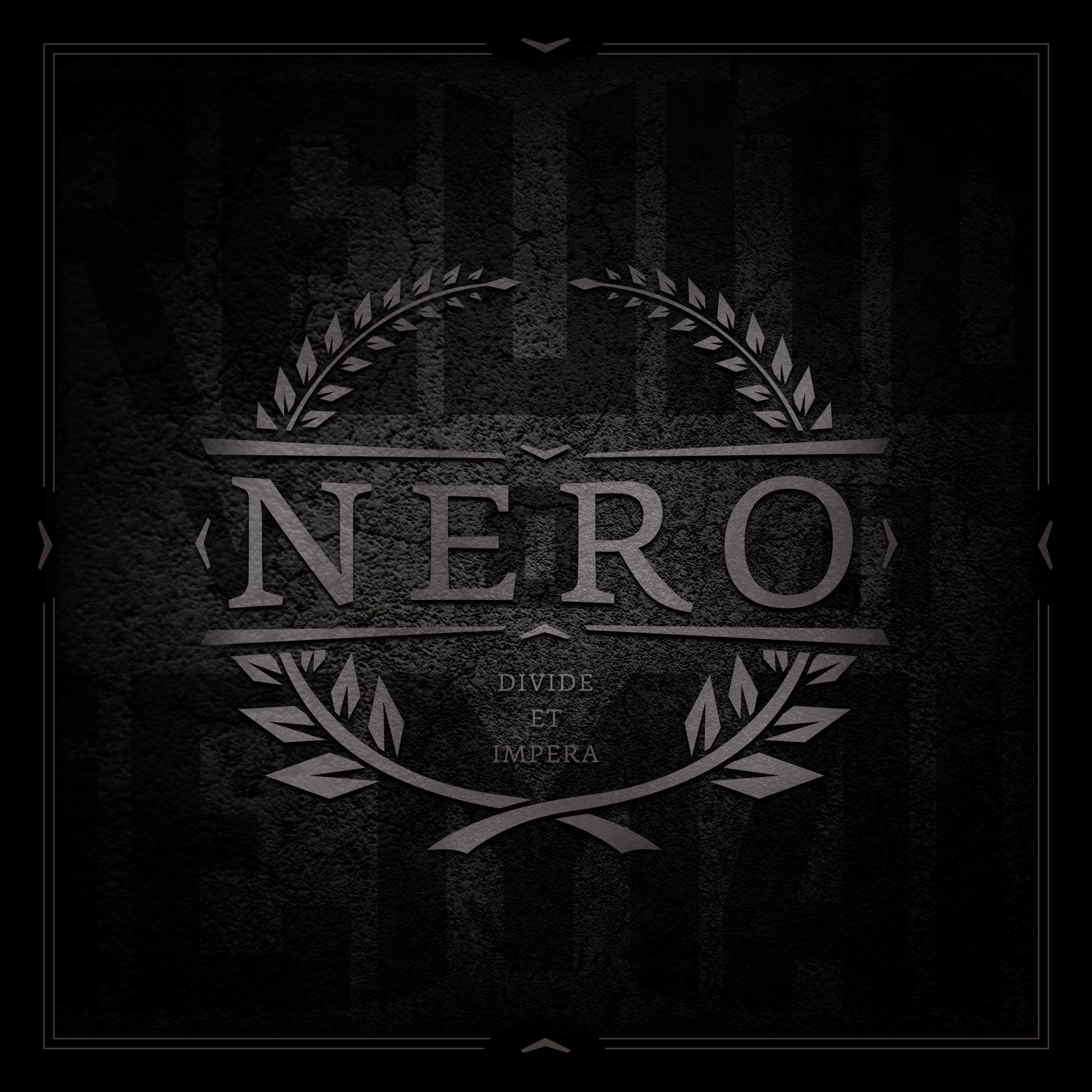 Cover des Albums „Nero“